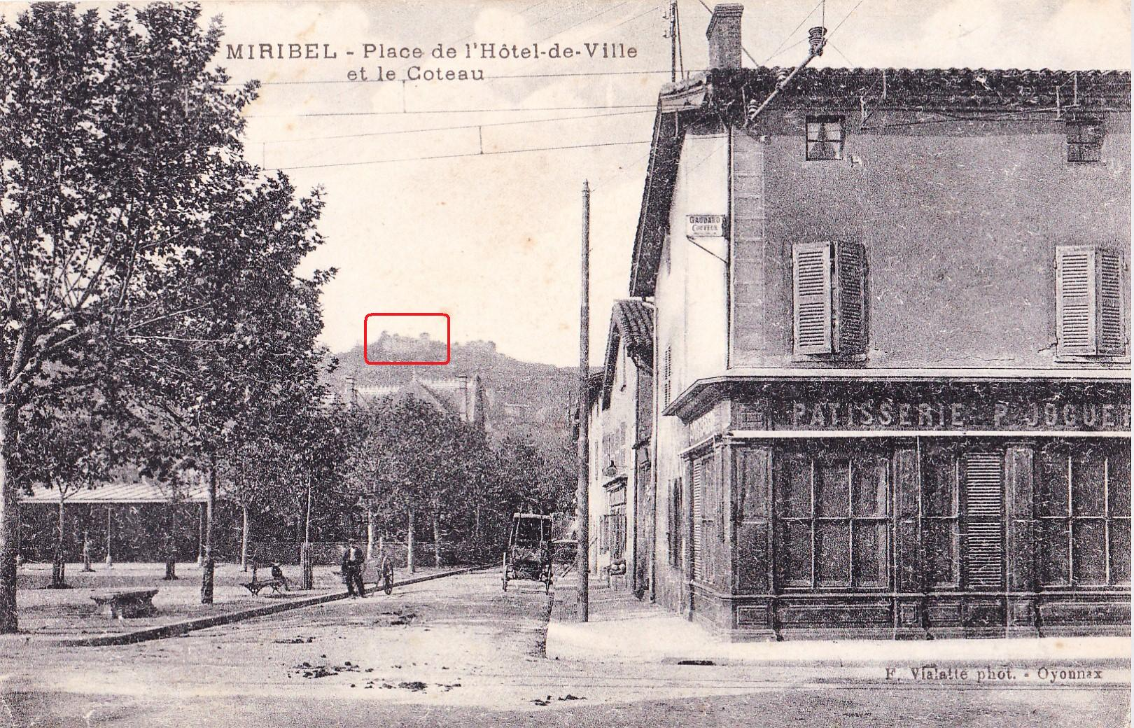 Place du marché de Miribel et château de Miribel (aujourd'hui détruit) sur le coteau.